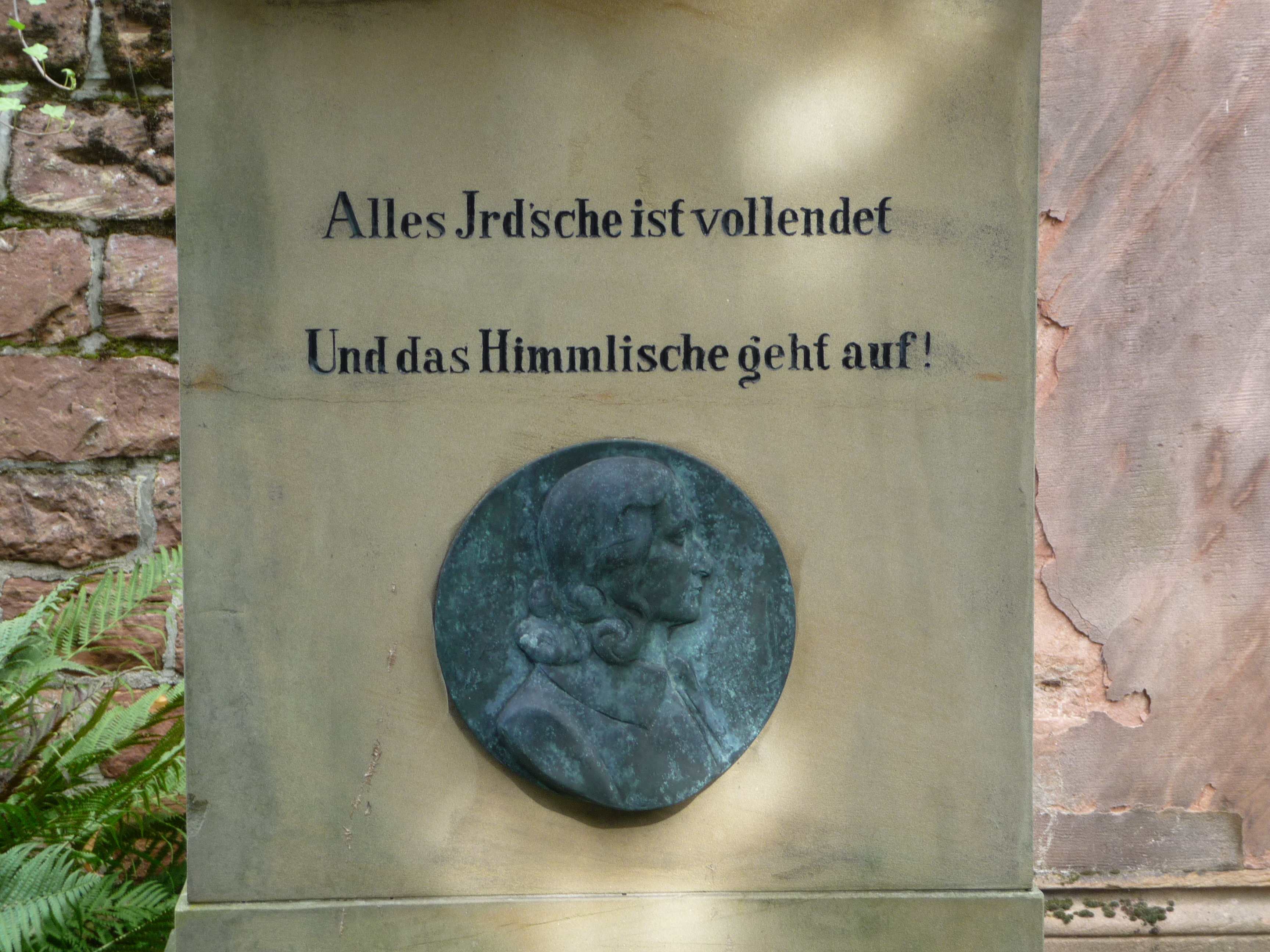 Hauptfriedhof Mannheim